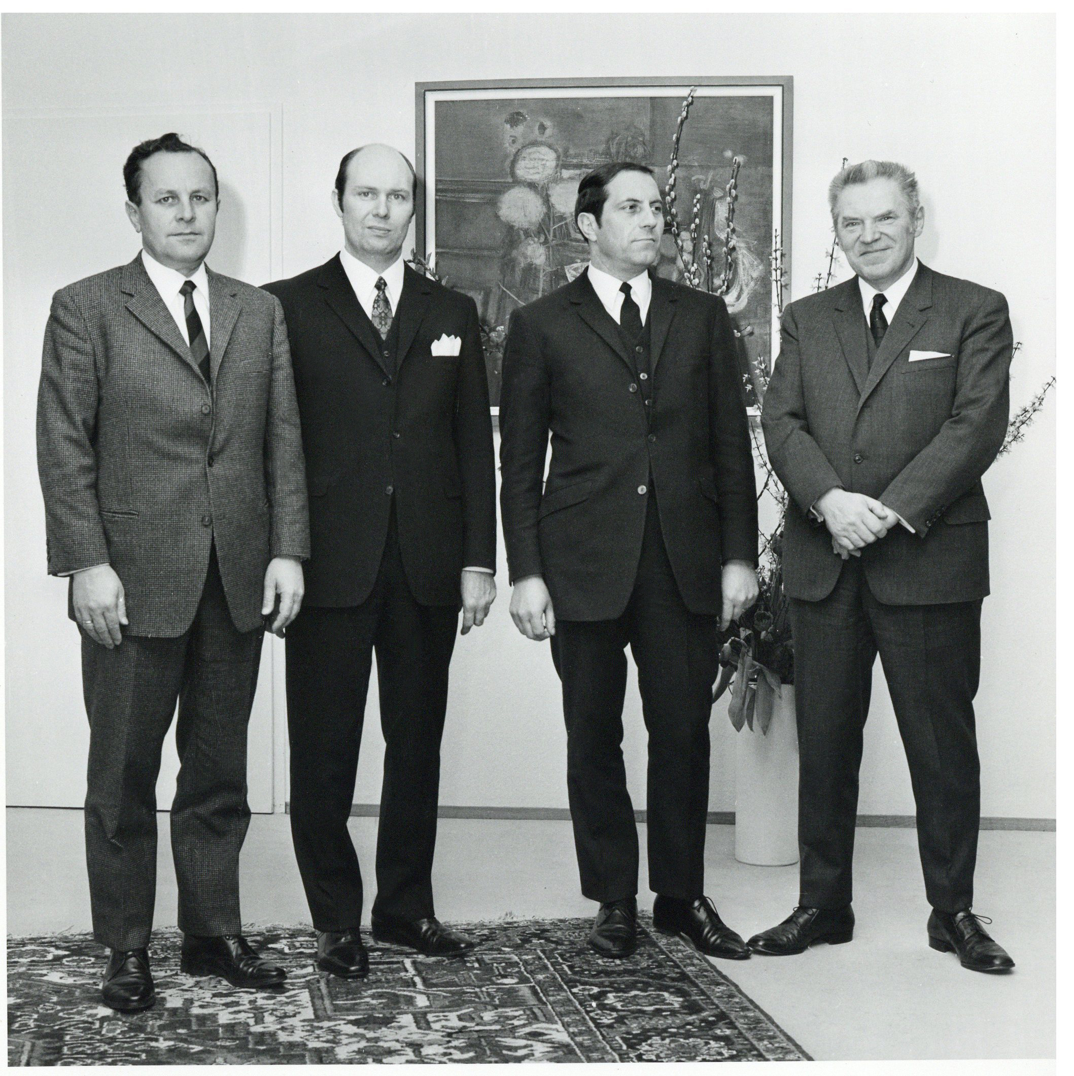 Günter Nawrath (damaliger Vorstandsvorsitzender des Otto Versands), Horst Hansen (1. Geschäftsführer der Hanseatic Bank), Hans Duve (Prokurist) und OTTO-Gründer Dr. Werner Otto (v.l.) im Jahr 1969.